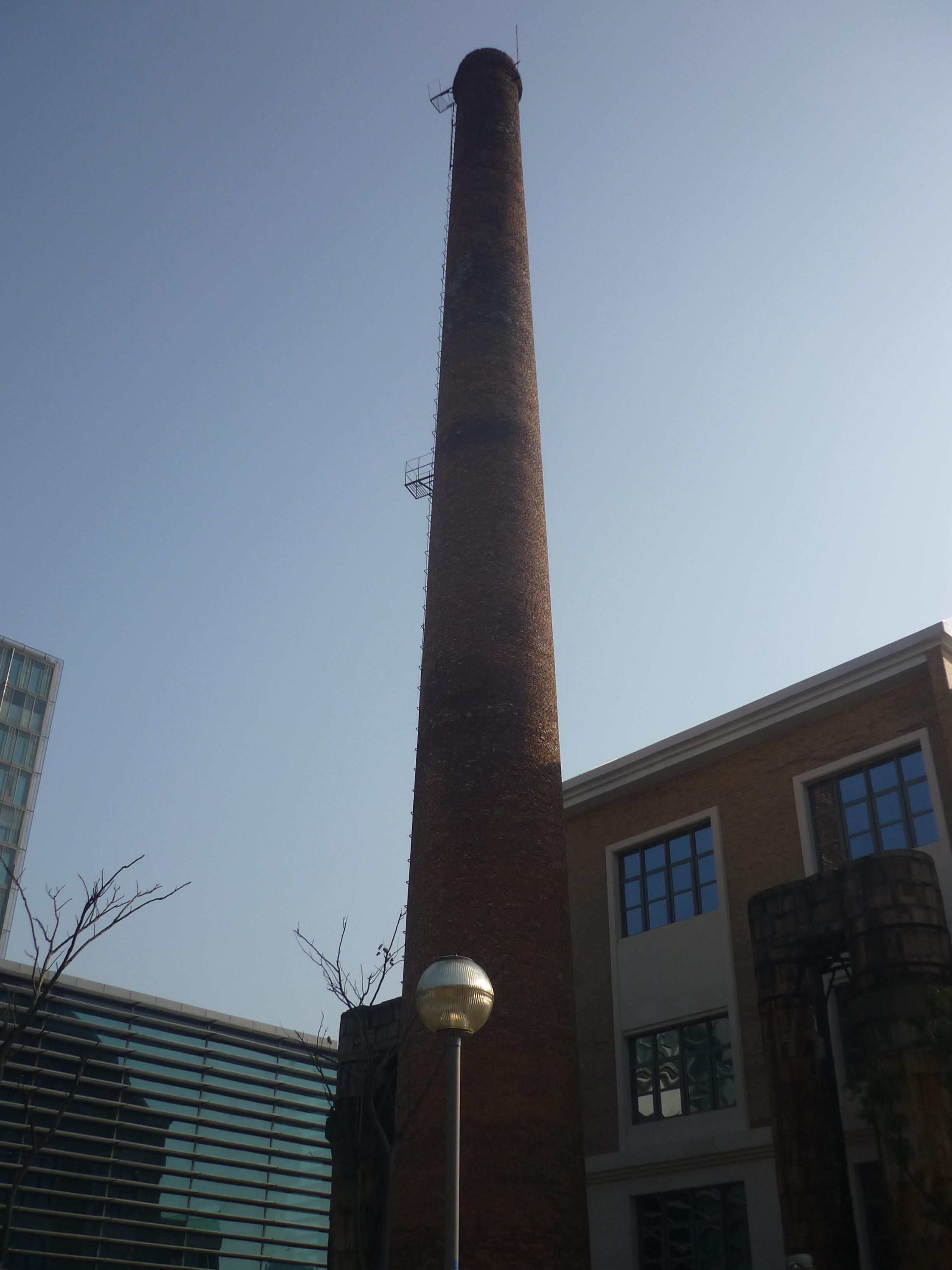 宁波书城内烟囱